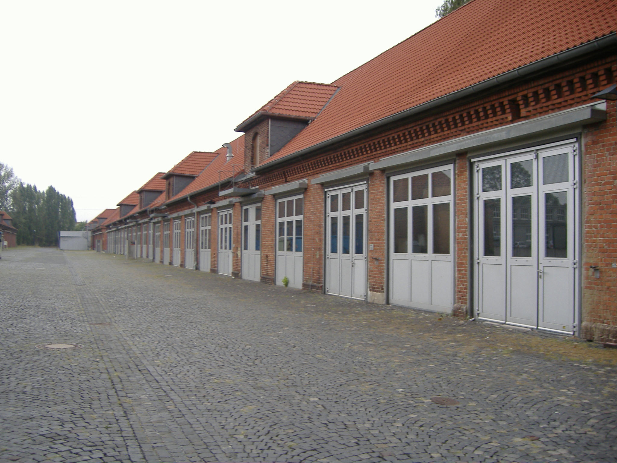 ehem. Reiterkaserne, 1898-1901 gebaut als Paradebeispiel preußischer Kasernenarchitektur, heute Teil der Fachhochschule Leonardo-Campus, Münster, Deutschland Pferdekoppeln mit in den 60. Jahren nachgerüsteten Toren. Tag des offenen Denkmals, Panoramafreiheit Foto: Elkin Fricke --Managementboy 12:27, 16 September 2005 (UTC)